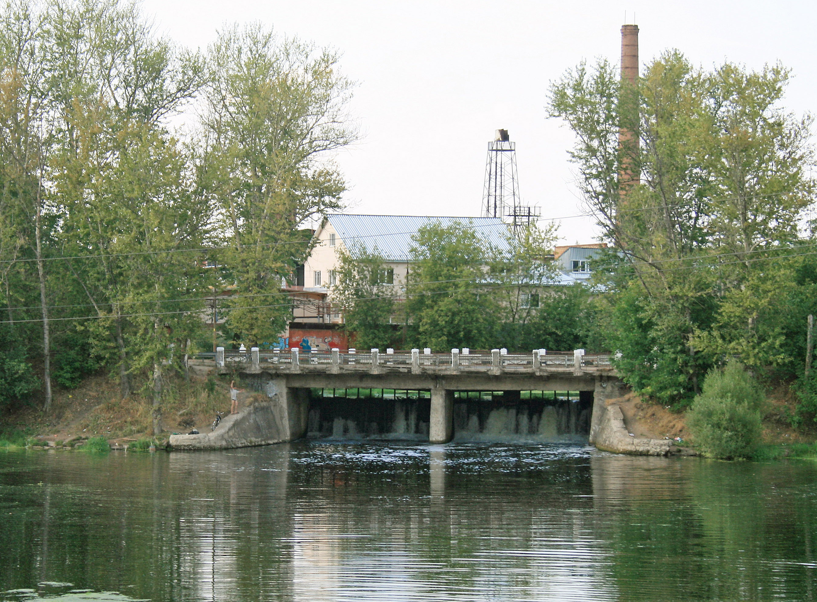 Мост и плотина на реке Уча. Город Ивантеевка Московской области.